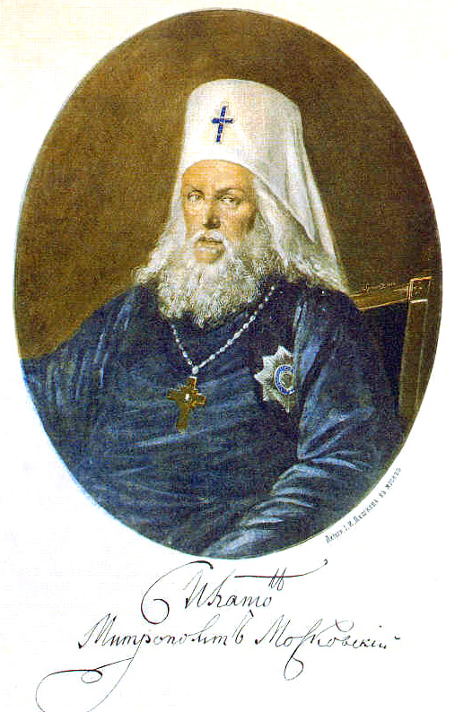 Митрополит Московский и Коломенский Платон (Левшин). Литография XIX века.